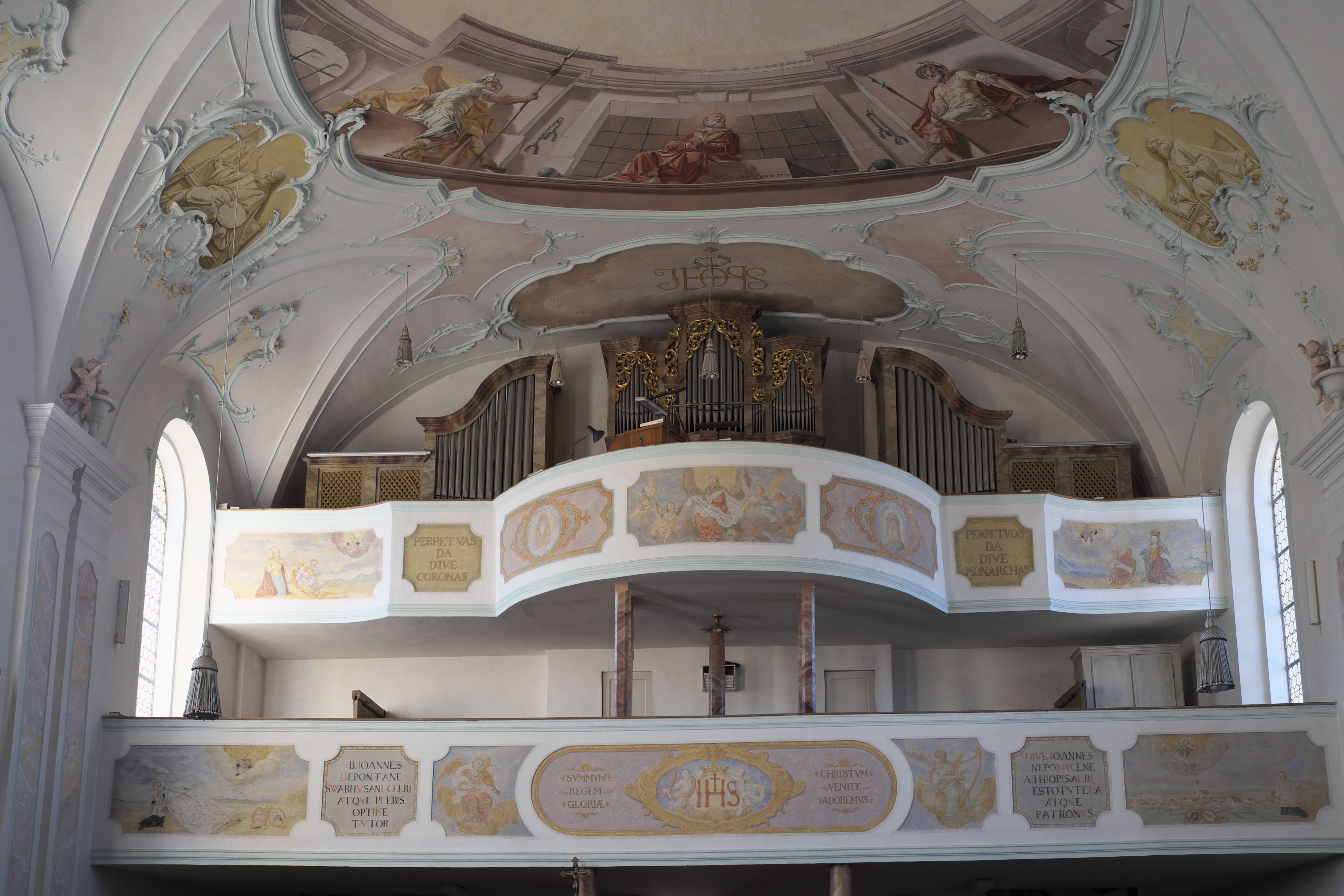 Katholische Pfarrkirche St. Sixtus in Moorenweis im Landkreis Fürstenfeldbruck (Bayern/Deutschland), Doppelempore